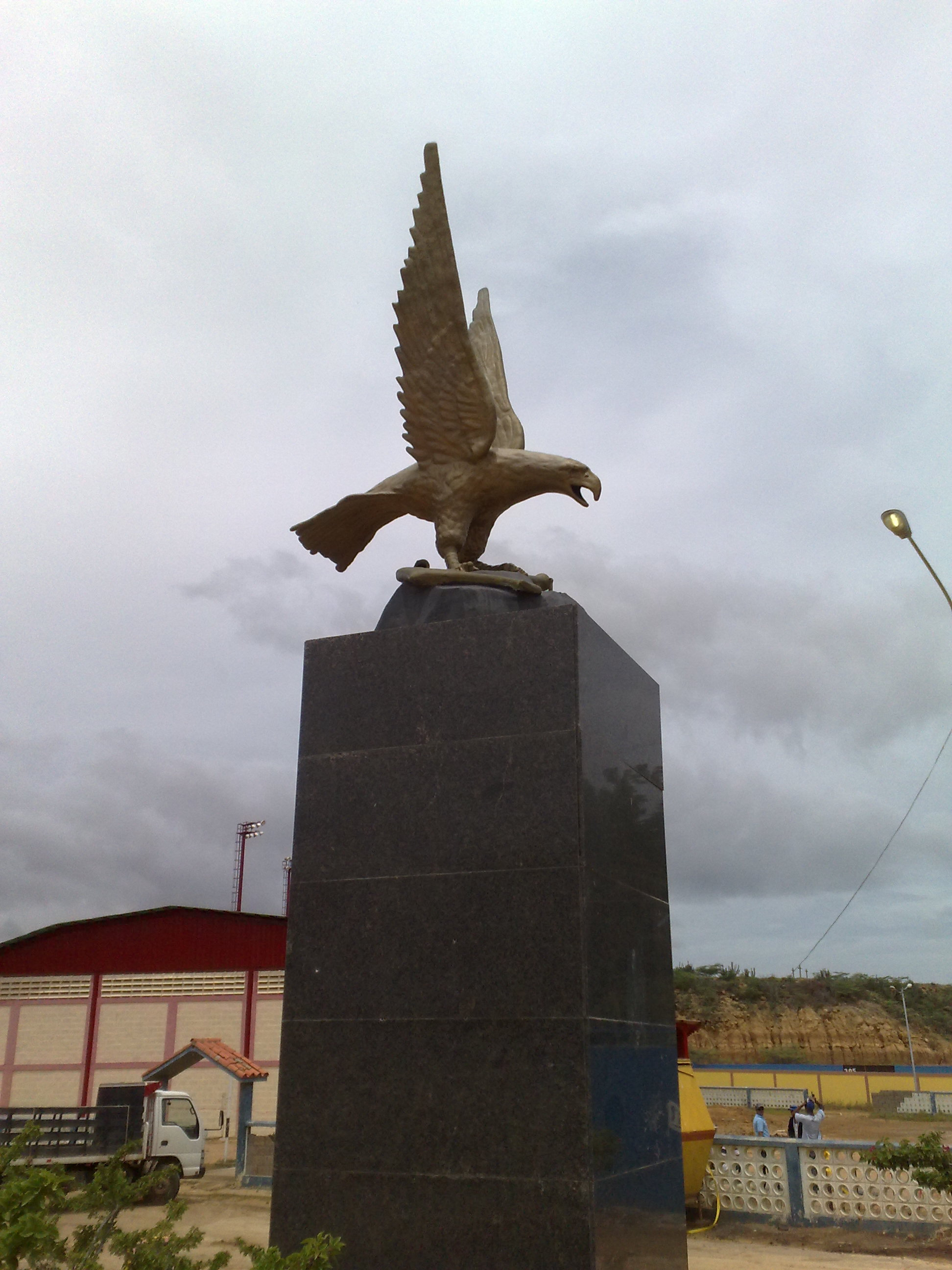 Plaza el Águila, Santa Cruz de Los Taques. El águila está hecho de bronce.